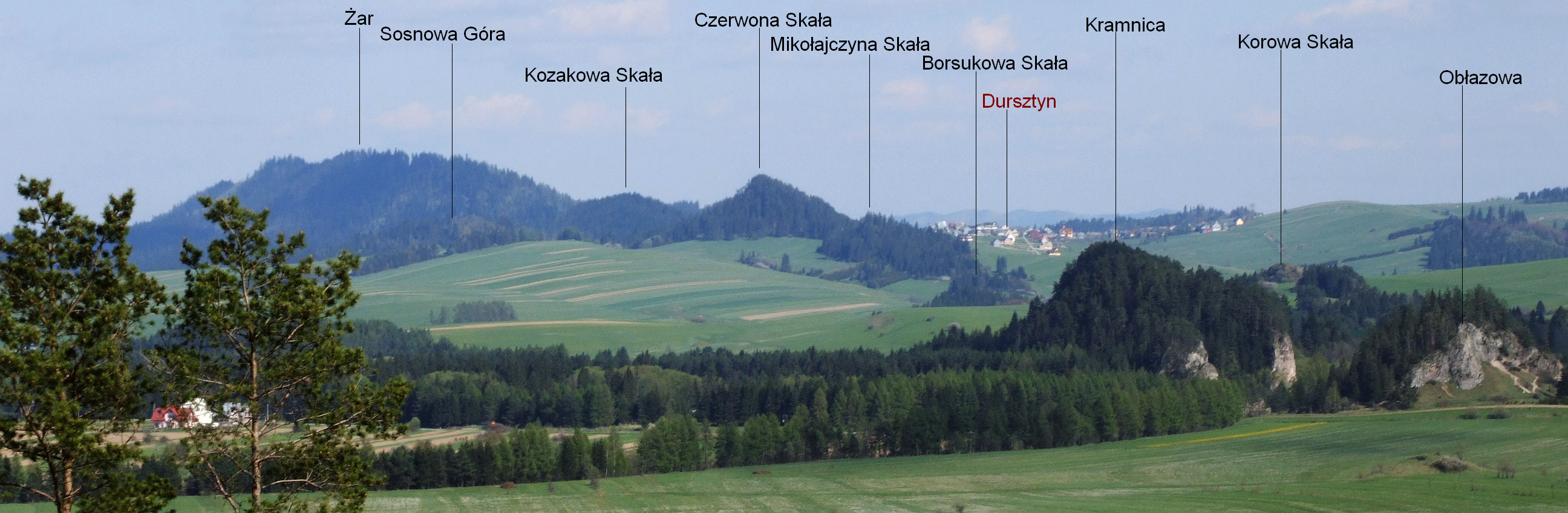 Widok z Cisowej Skały